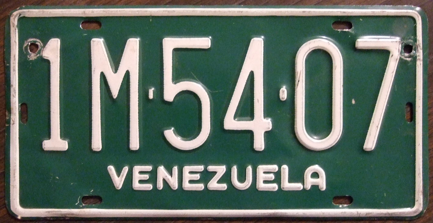 License plate of Venezuela